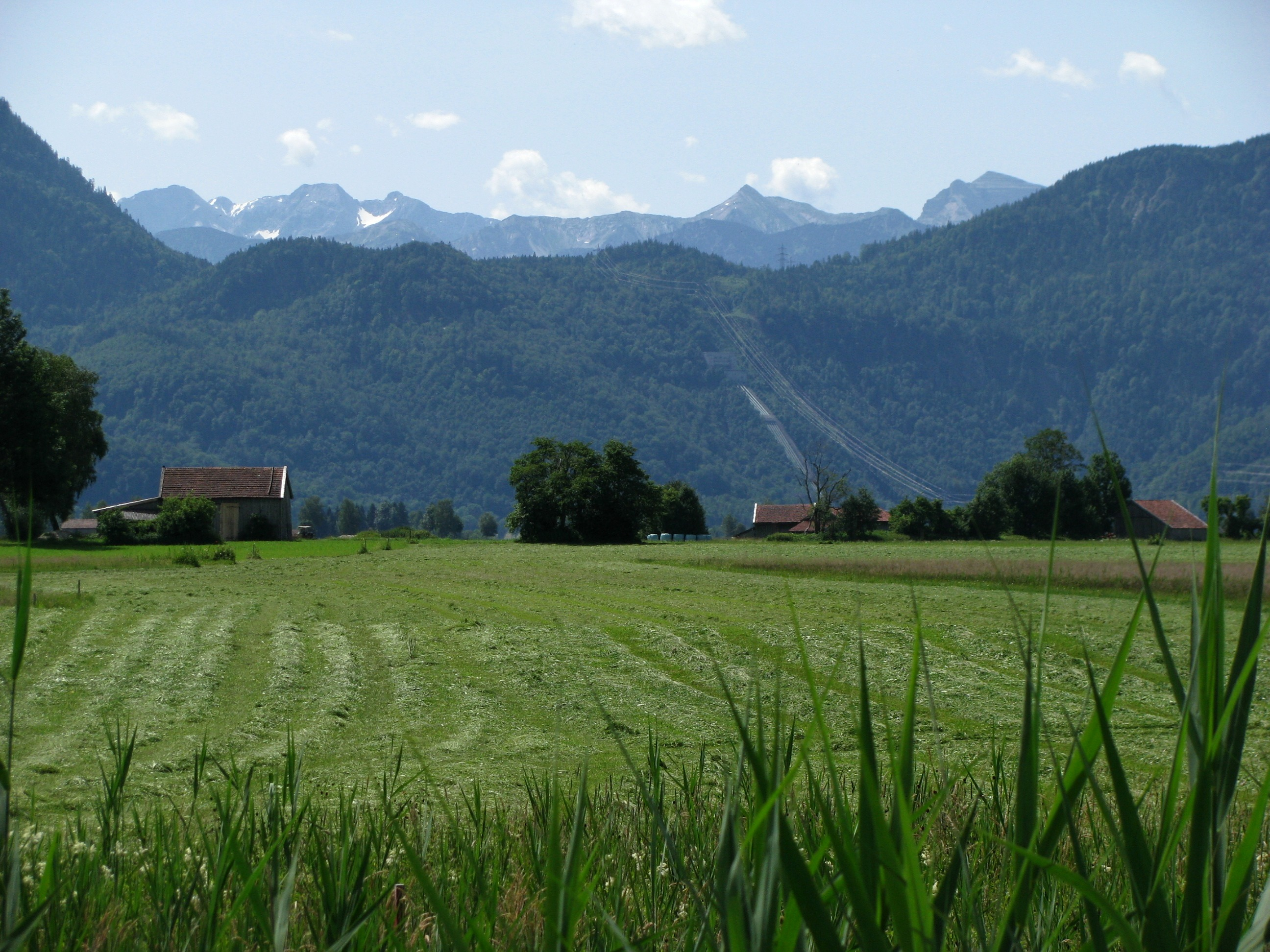 Kesselberg aus nördlicher Richtung (nahe Eichsee in den Loisach-Kochelsee-Mooren); halbrechts im Bild sichtbar die Druckrohre des Walchenseekraftwerks.